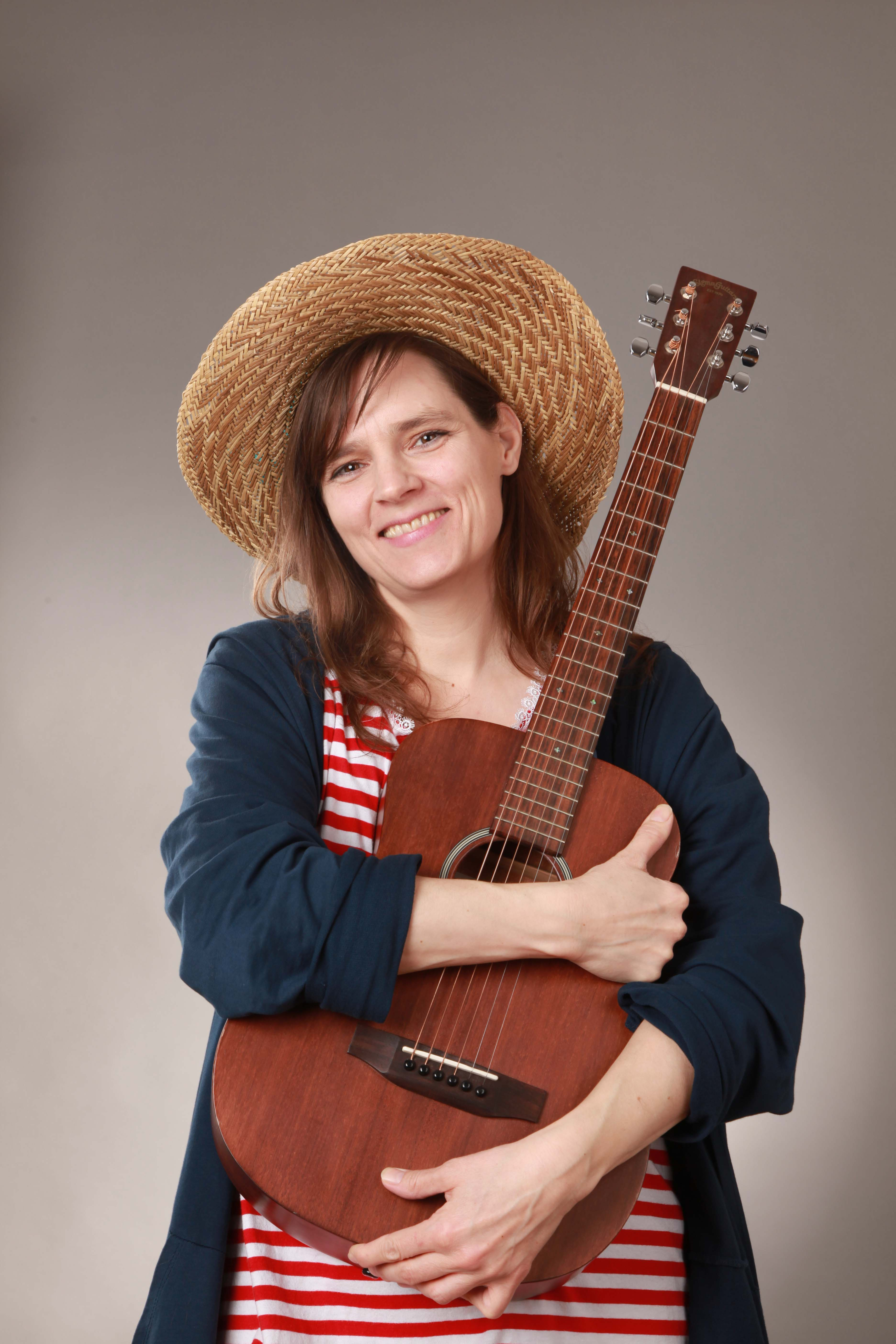 Christine Raudies – Raudieschen, Autorin, Kinderliedmacherin, Literaturpädagogin, Textdichterin